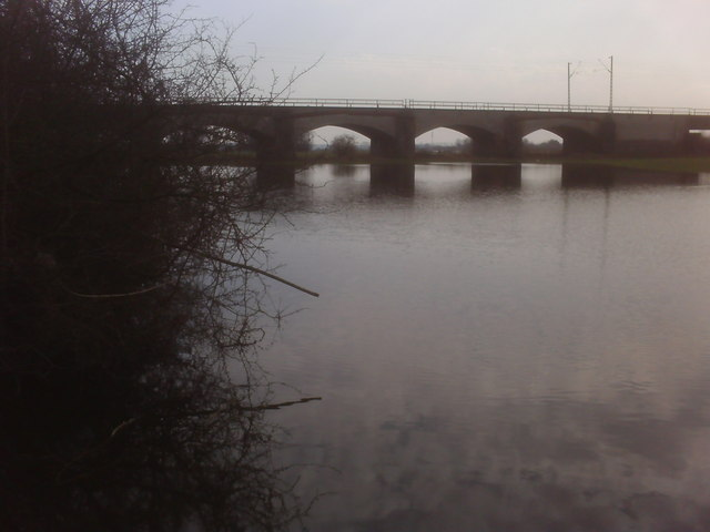 Verden: Allerhochwasser unter der Eisenbahnbr�cke